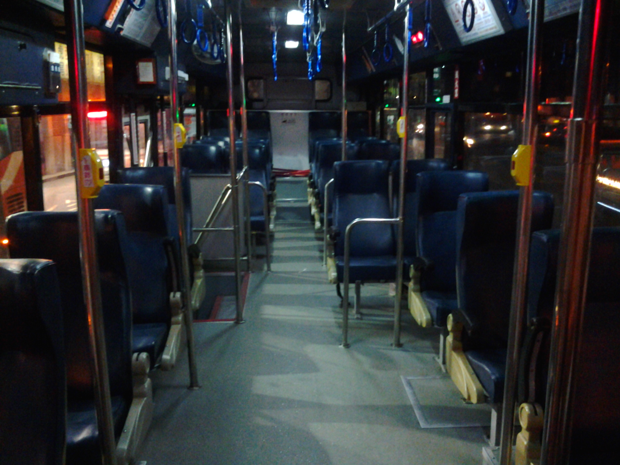 台中客運 2004〈2011〉 HINO ERK2JML（日盈）